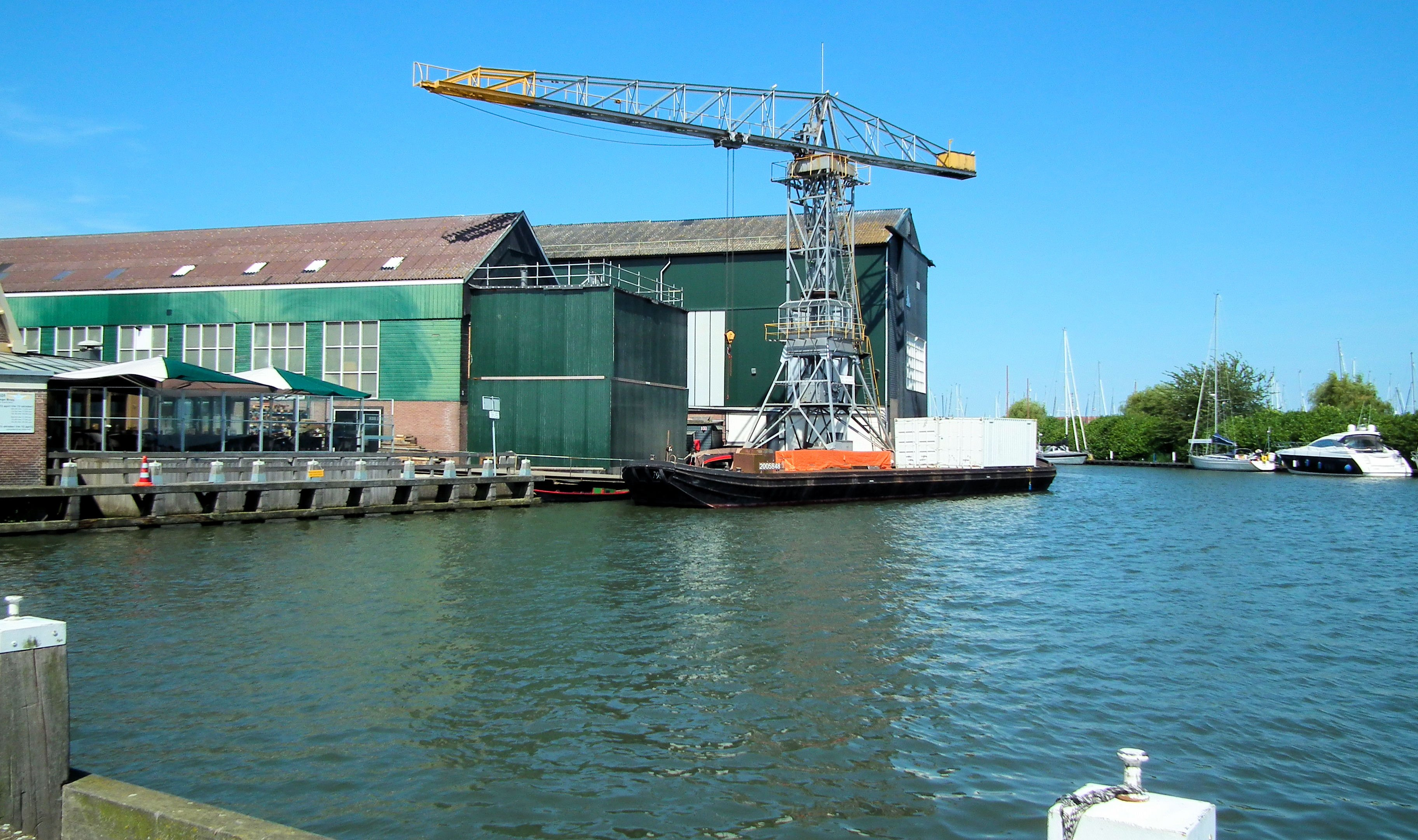 Nederland - Monnickendam. De Haven